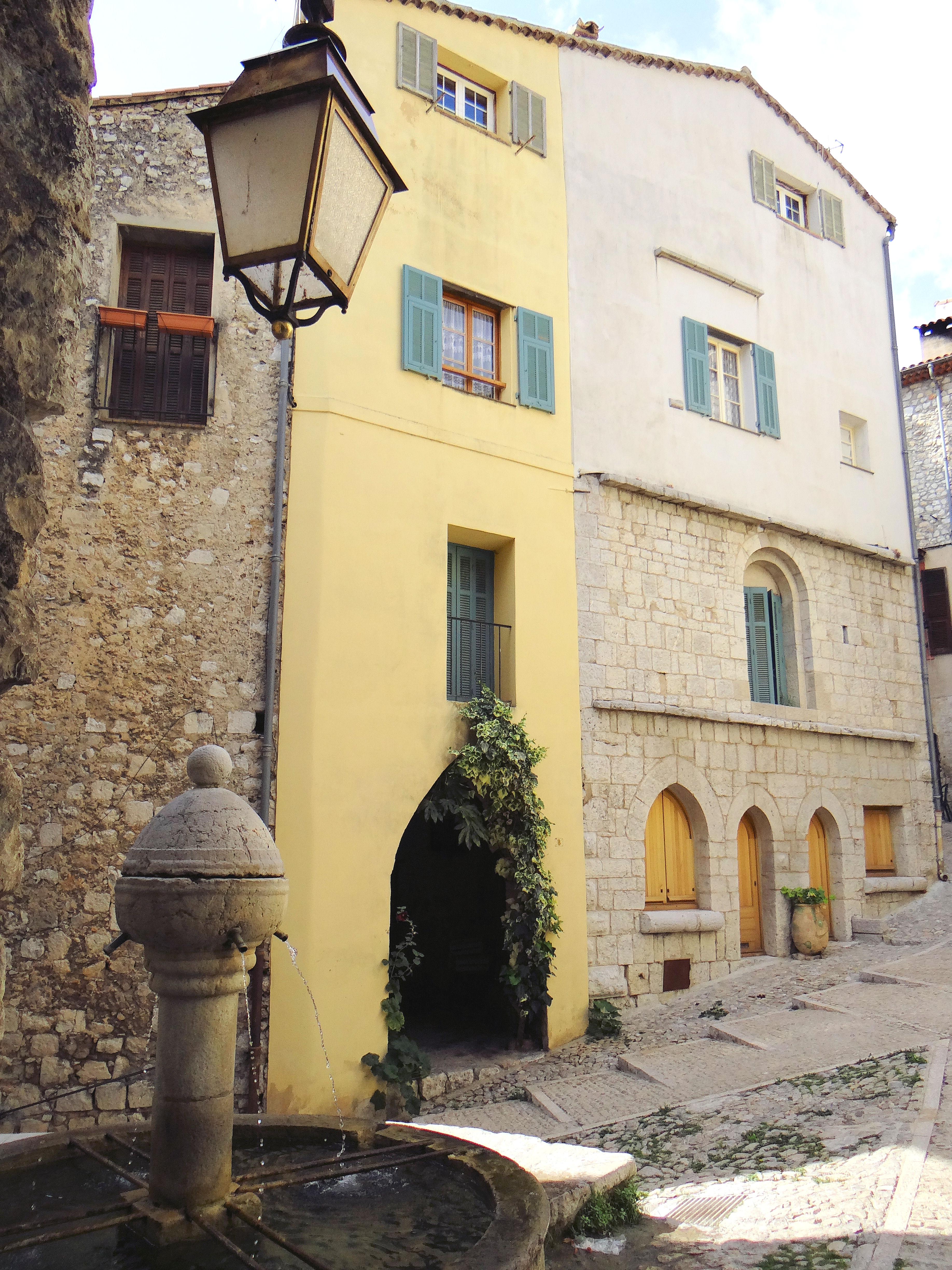 Peille - Place du Mont-Agel (ancienne place Lascaris) - Palais du Juge Mage (ou palais des Consuls) et fontaine .